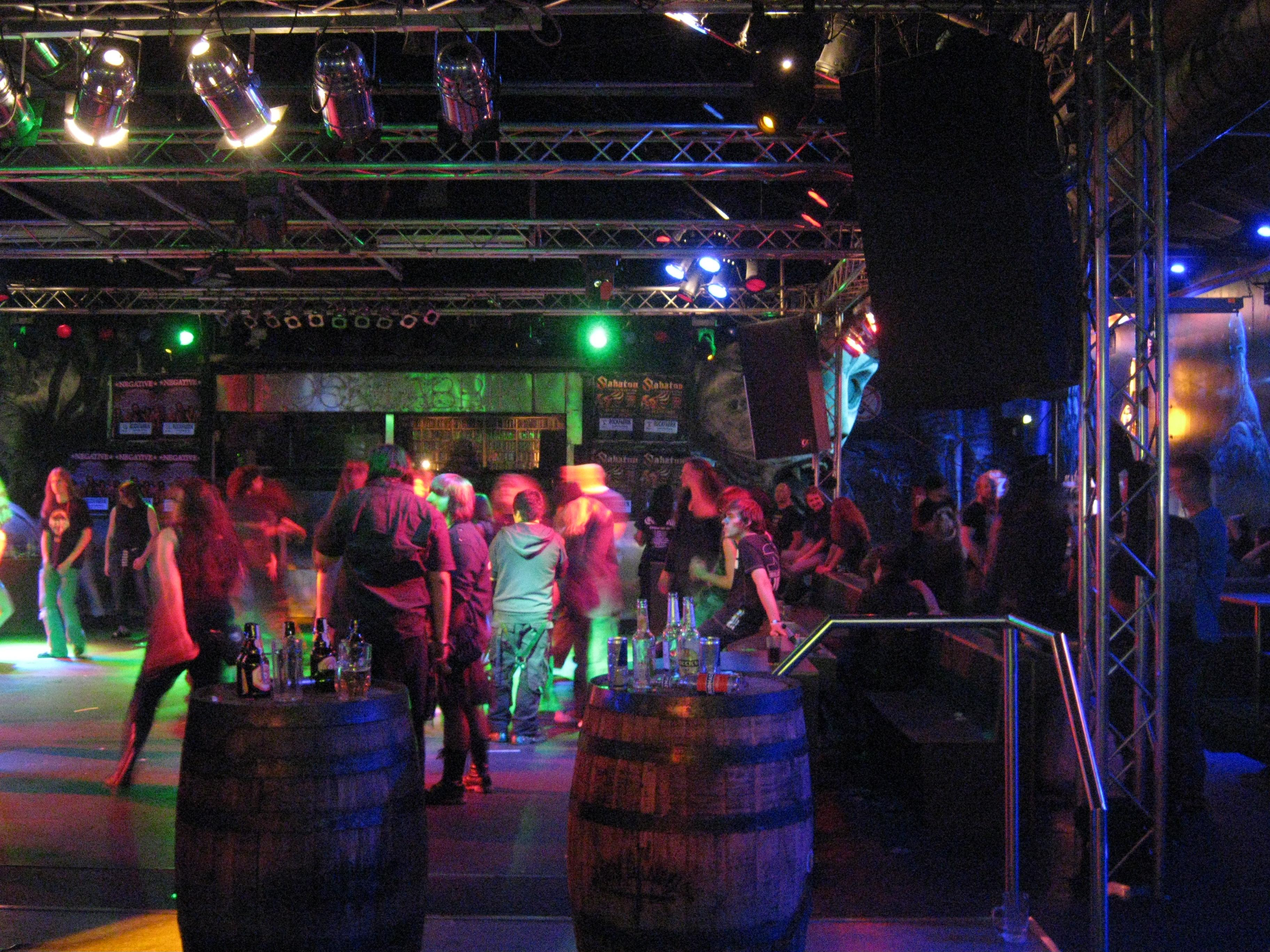 Der Haupttanzbereich der Diskothek Rockfabrik. Blick zum DJ Pult.